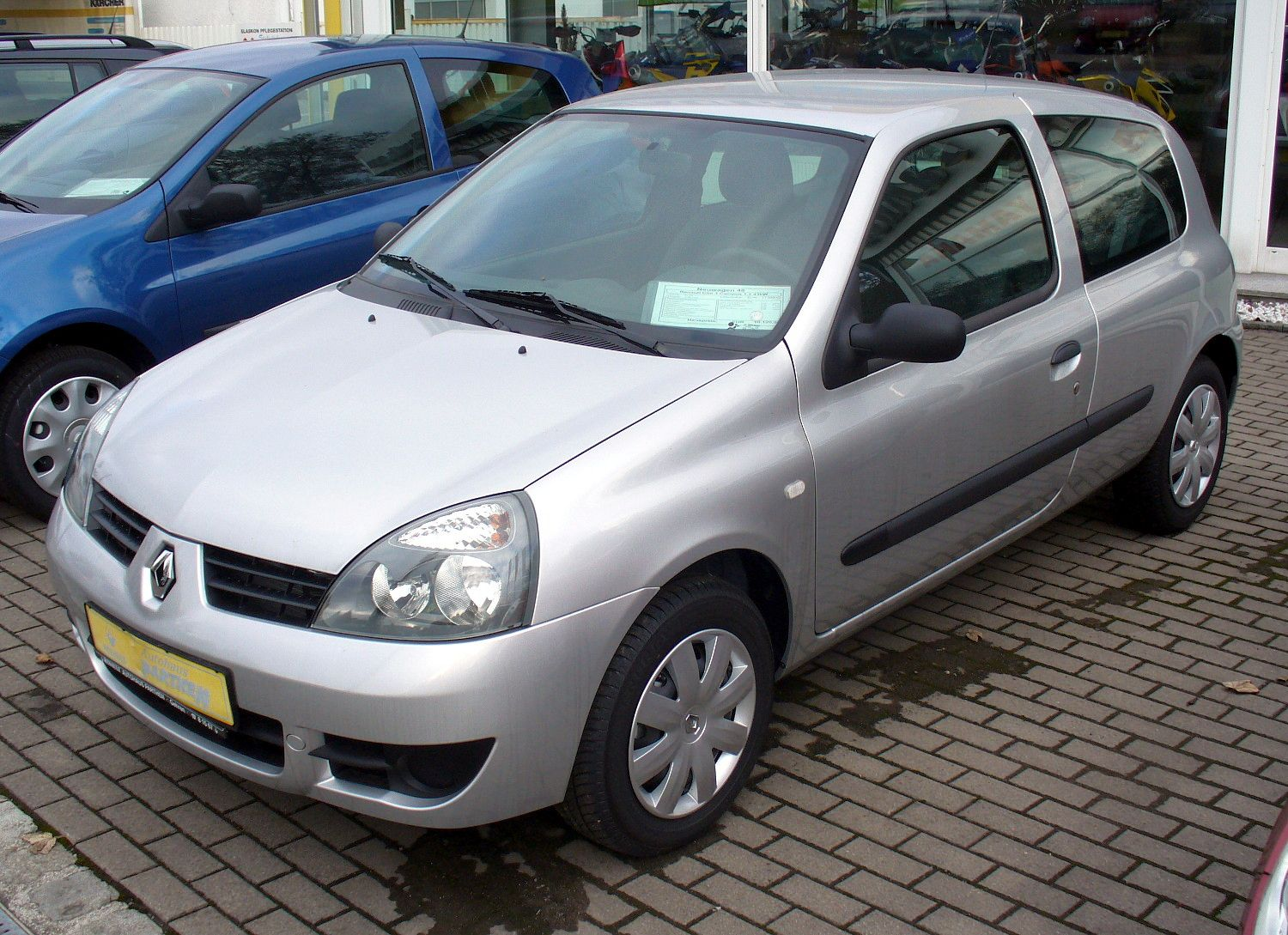 Renault Clio II